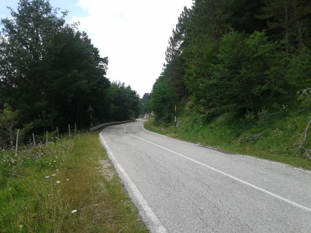 Strada provinciale 17 Marsica Pescina-Bisegna-Pescasseroli